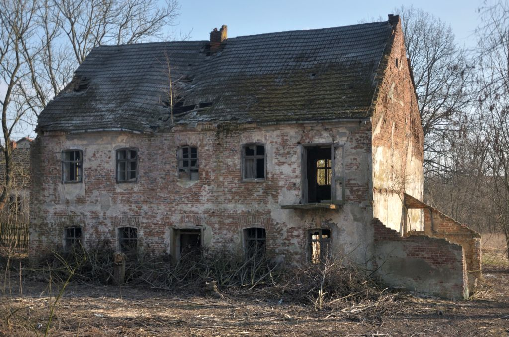 Budynek Komisariatu SG do 1928 r. w Goli, stan w 2017 r.